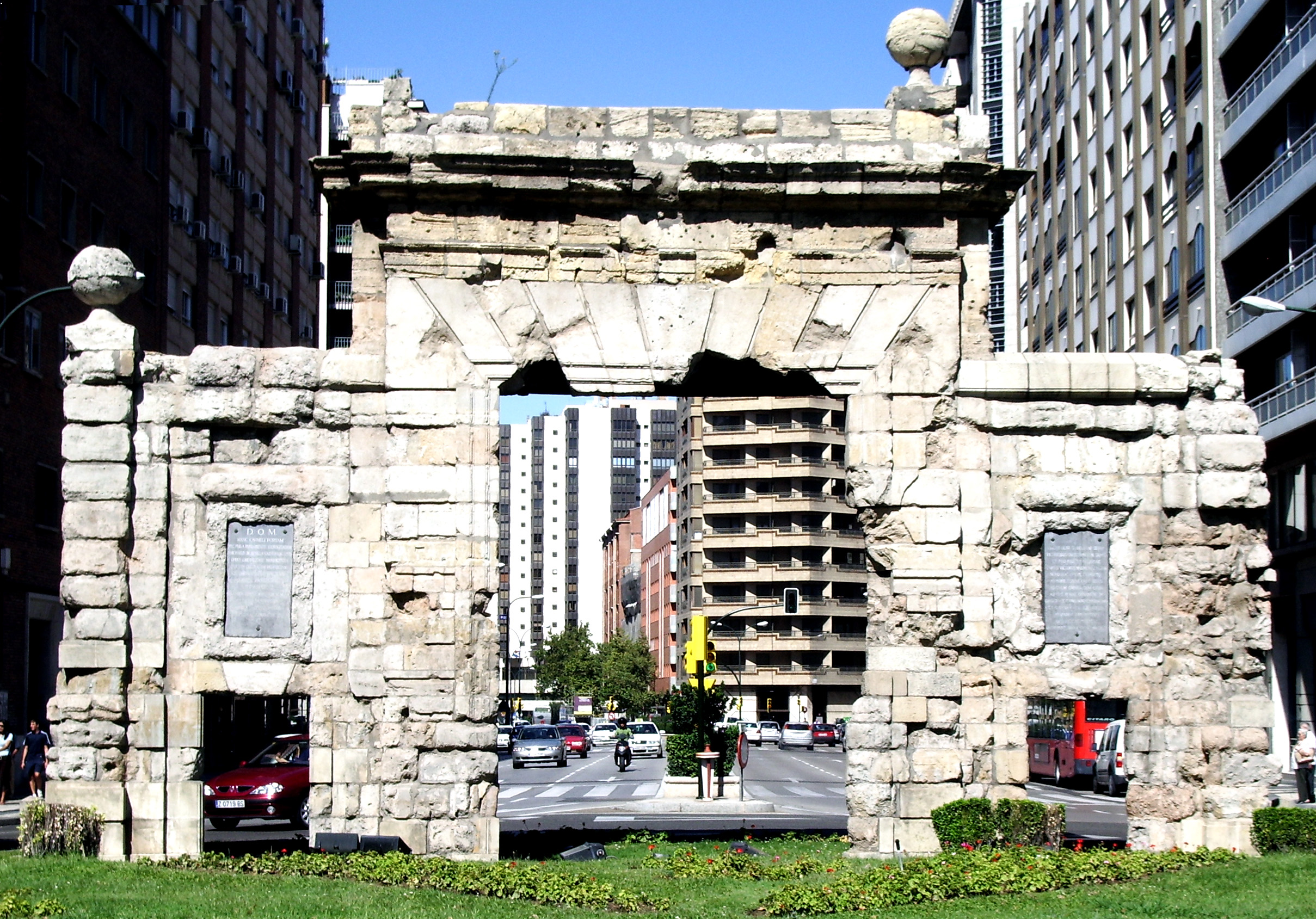 Puerta del Carmen, Zaragoza (España)